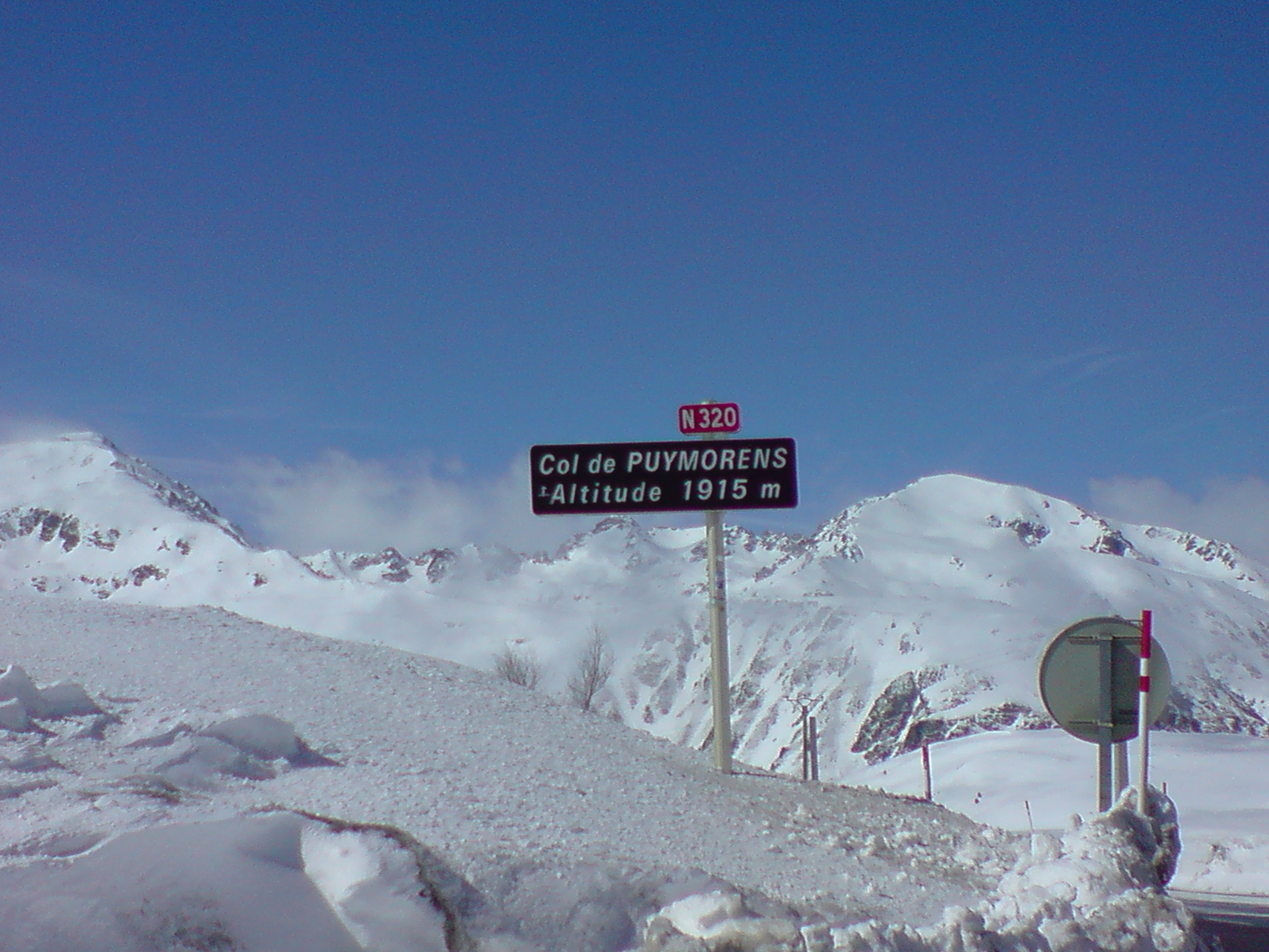 Photo du panneau du col de Puymorens, altitude 1915m.